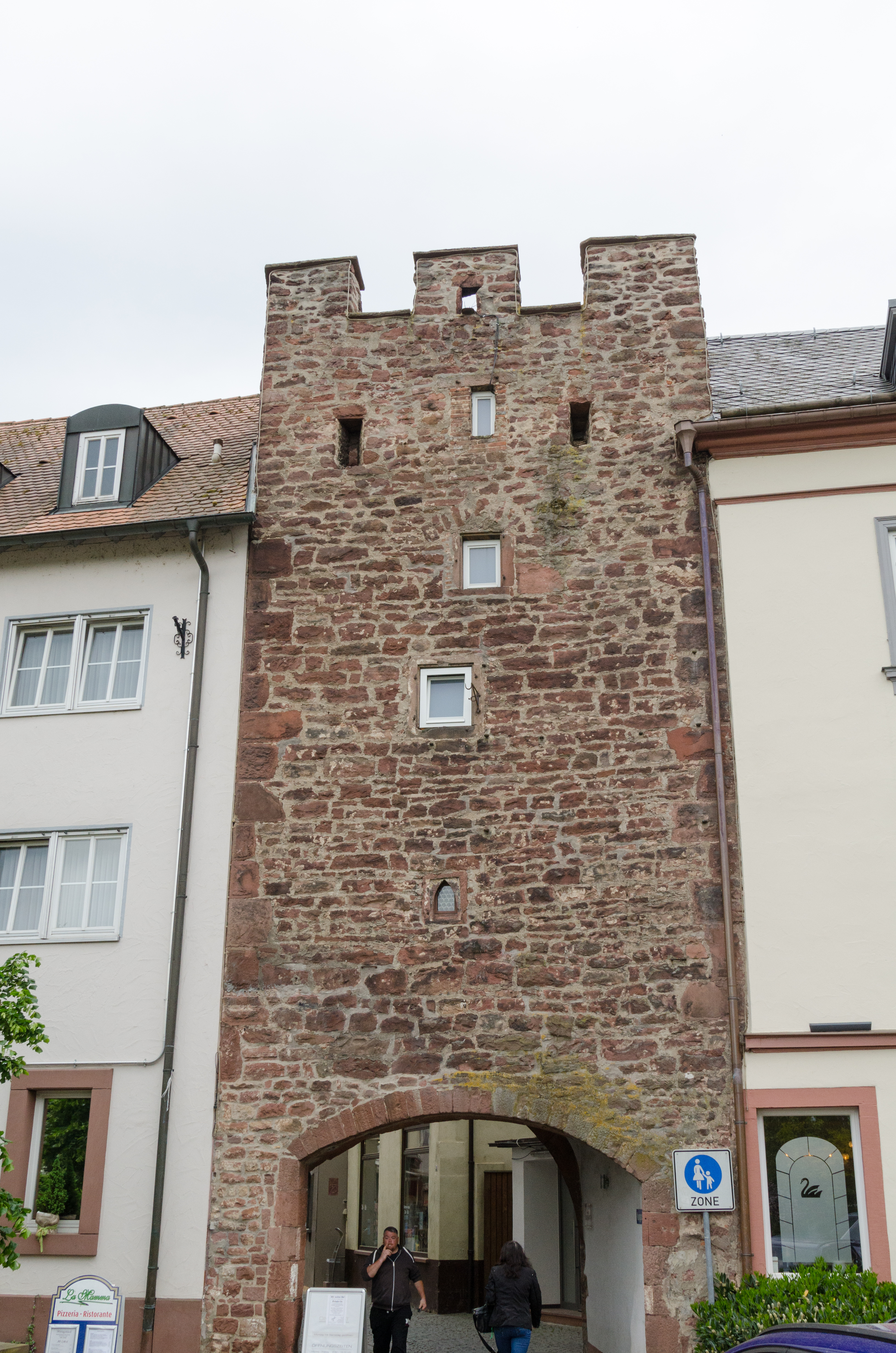 Wertheim, Maingasse, Maintor